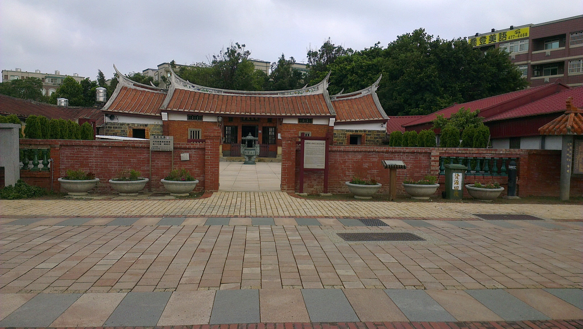 中文（台灣）: 第5代新屋范姜祖堂。